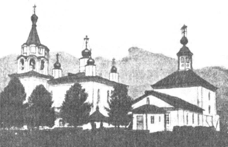 Иллюстрация книги "Православные русские обители" стр.083 илл.1